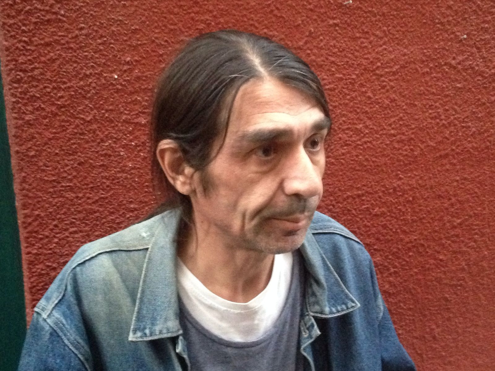 El poeta Ape Rotoma en Aranda de Duero, 21 de abril de 2017